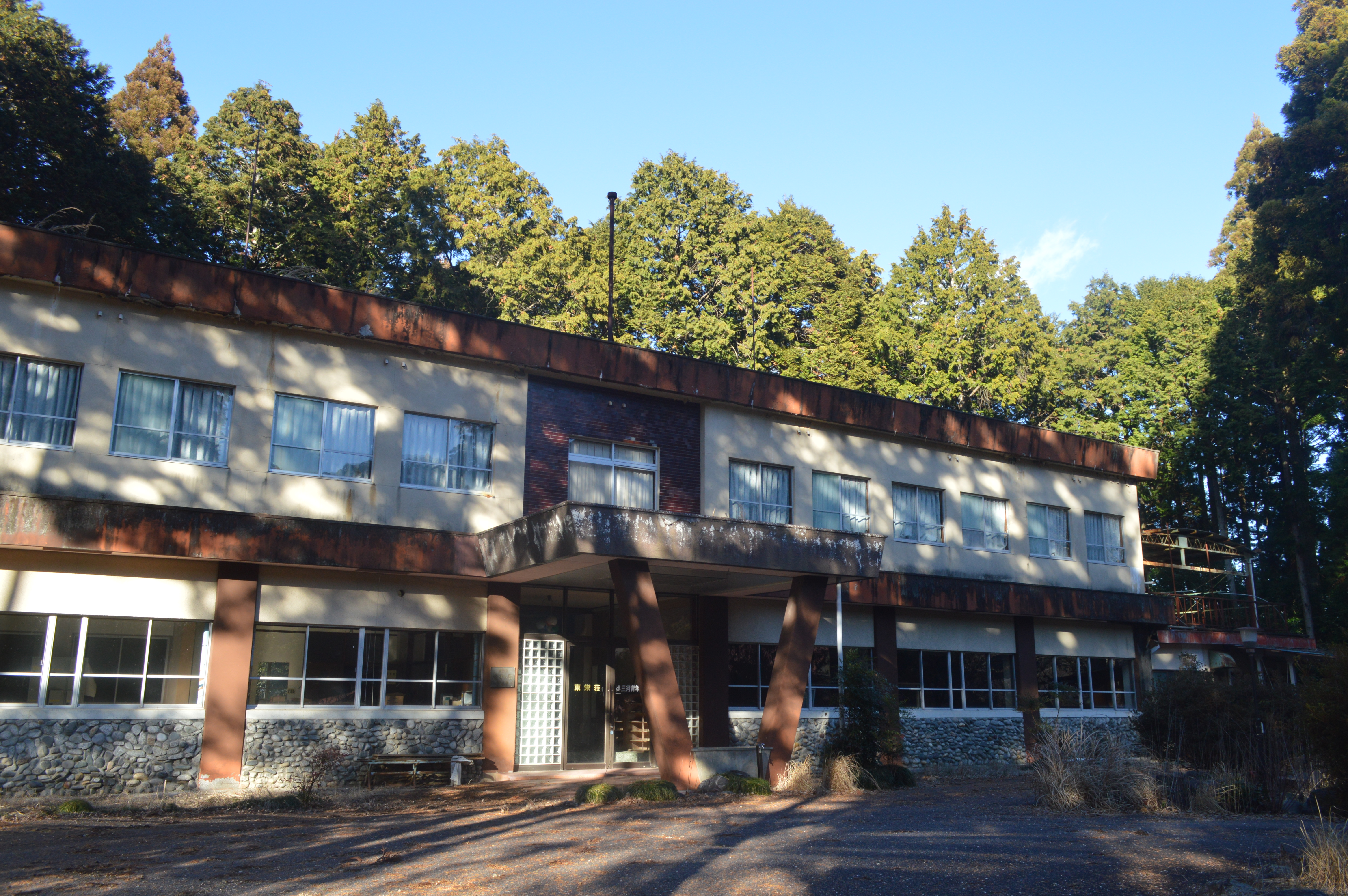 愛知県北設楽郡東栄町の町営宿泊施設である東栄荘。